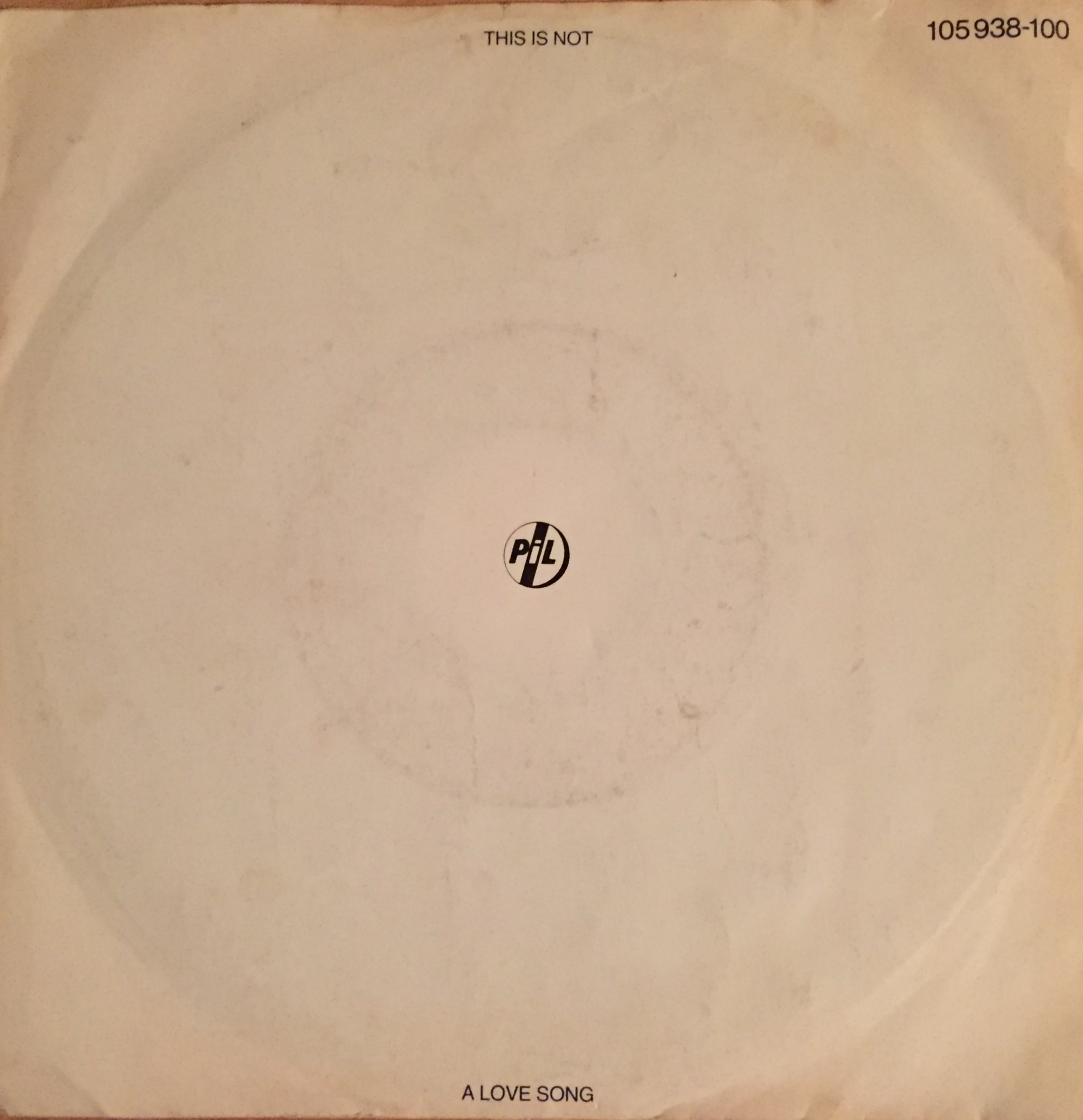 Public Imige Ltd. P.I.L. Single "This is not a love song"